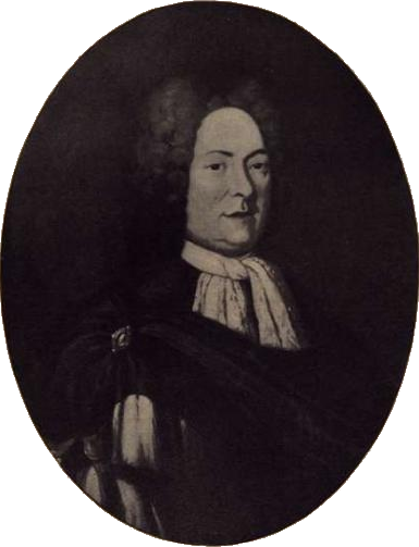 Kjøpmann James Collett (1655–1727).